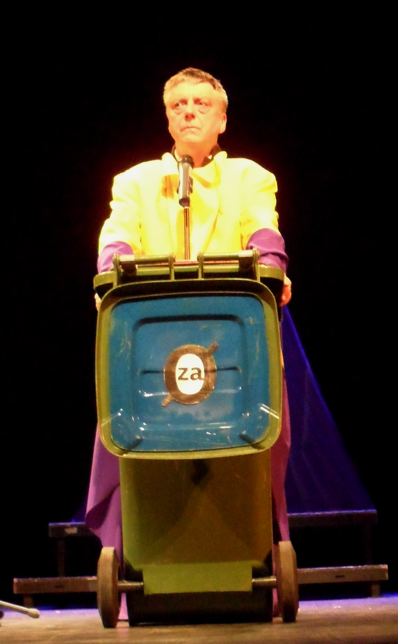 Andrej Rozman - Roza, slovenski književnik, med predstavo/obredom Zaničniško odmaševanje - Jaz sem za nič, Rozinteater, aprila 2012 na Tednu slovenske drame v Kranju